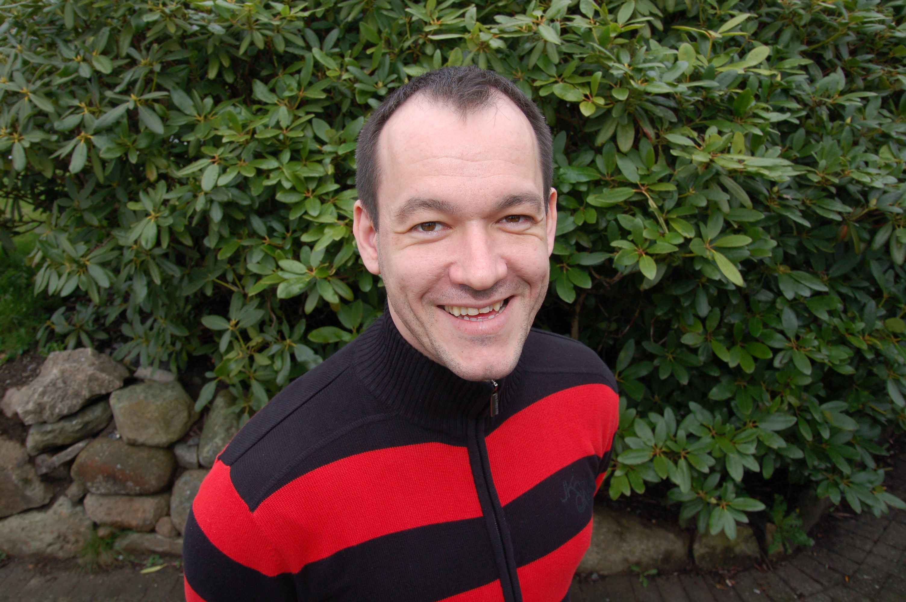 Leiar av Noregs Mållag 2009-2013